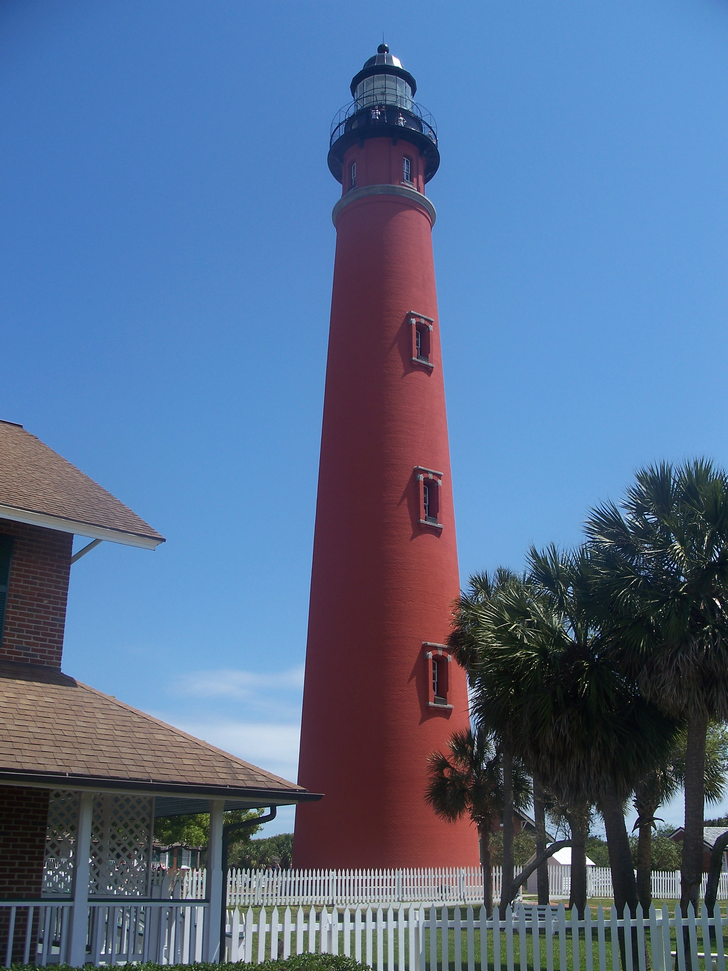 Ponce Inlet, Florida: Ponce de Leon Inlet Light